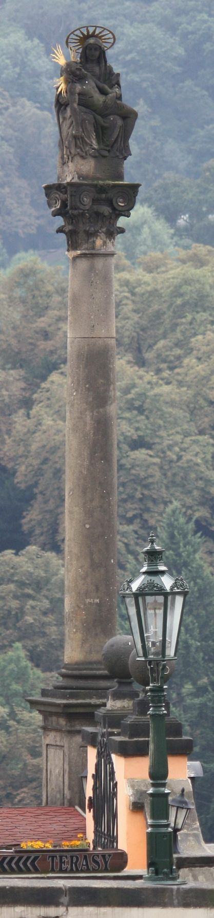 Praha, Hradčanské náměstí sloup Panny Marie Einsiedenské.